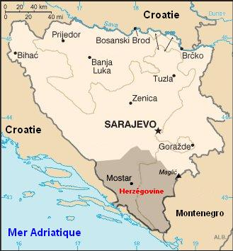 Herzégovine Auteur : Eugène